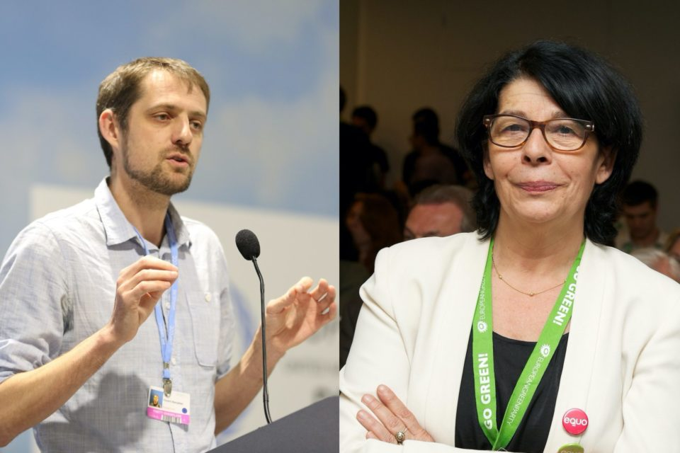 Florent Marcellesi e Inés Sabanés, actuales coportavoces de EQUO